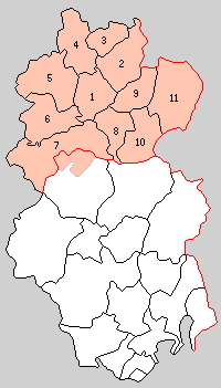 兵庫県佐用郡の町村制時点の町村。